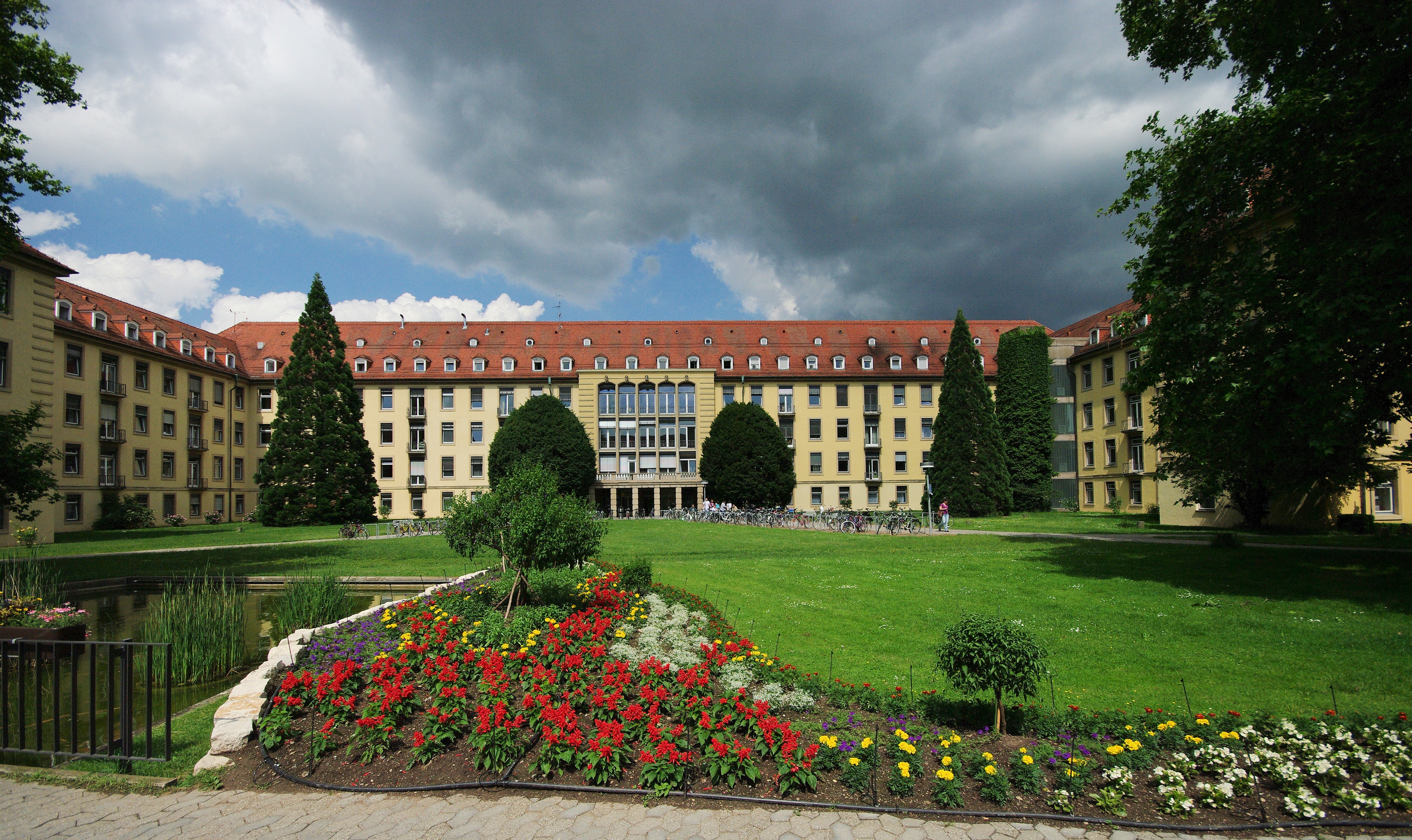 Universitätsklinikum Freiburg, Chirurgie